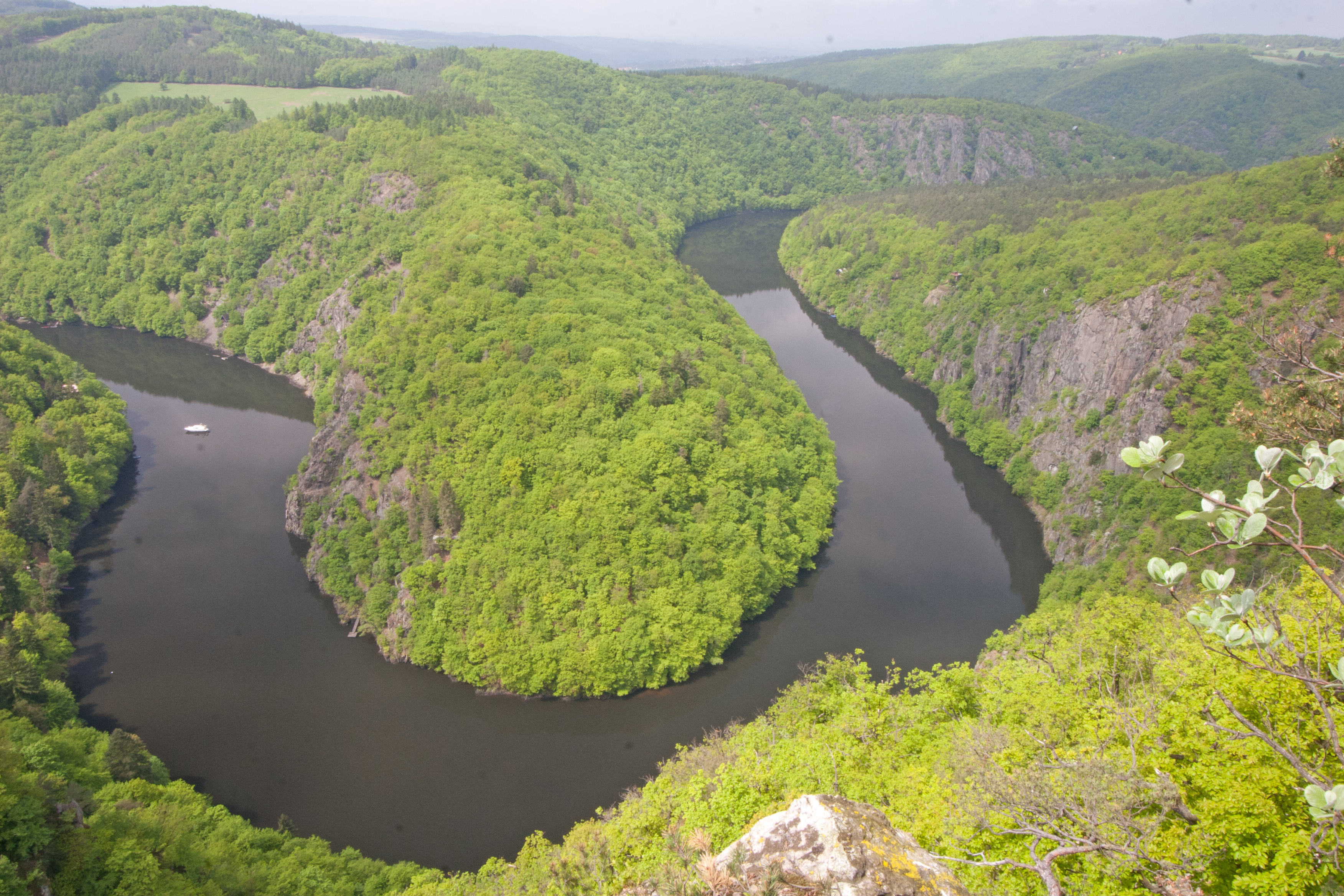 Skalní vyhlídka Máj u Teletína